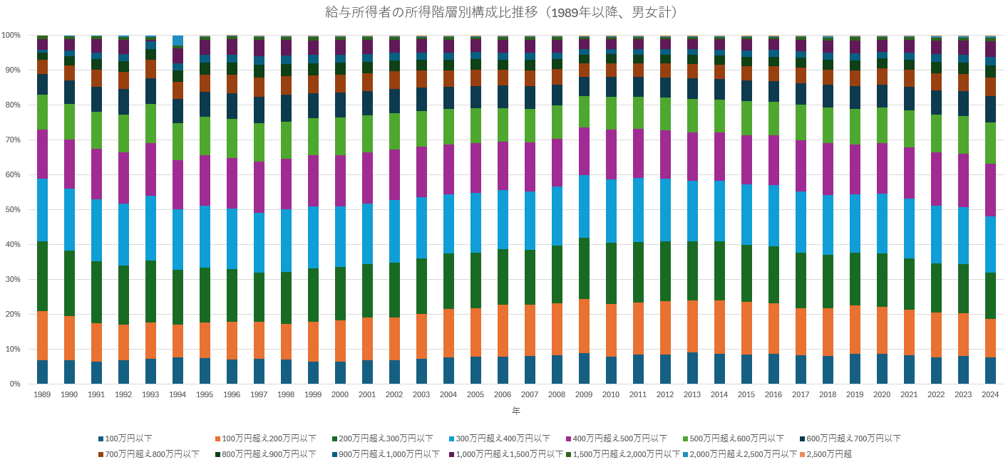 1989年以降の給与所得者の所得階層別構成比推移（100%積み上げ縦棒）